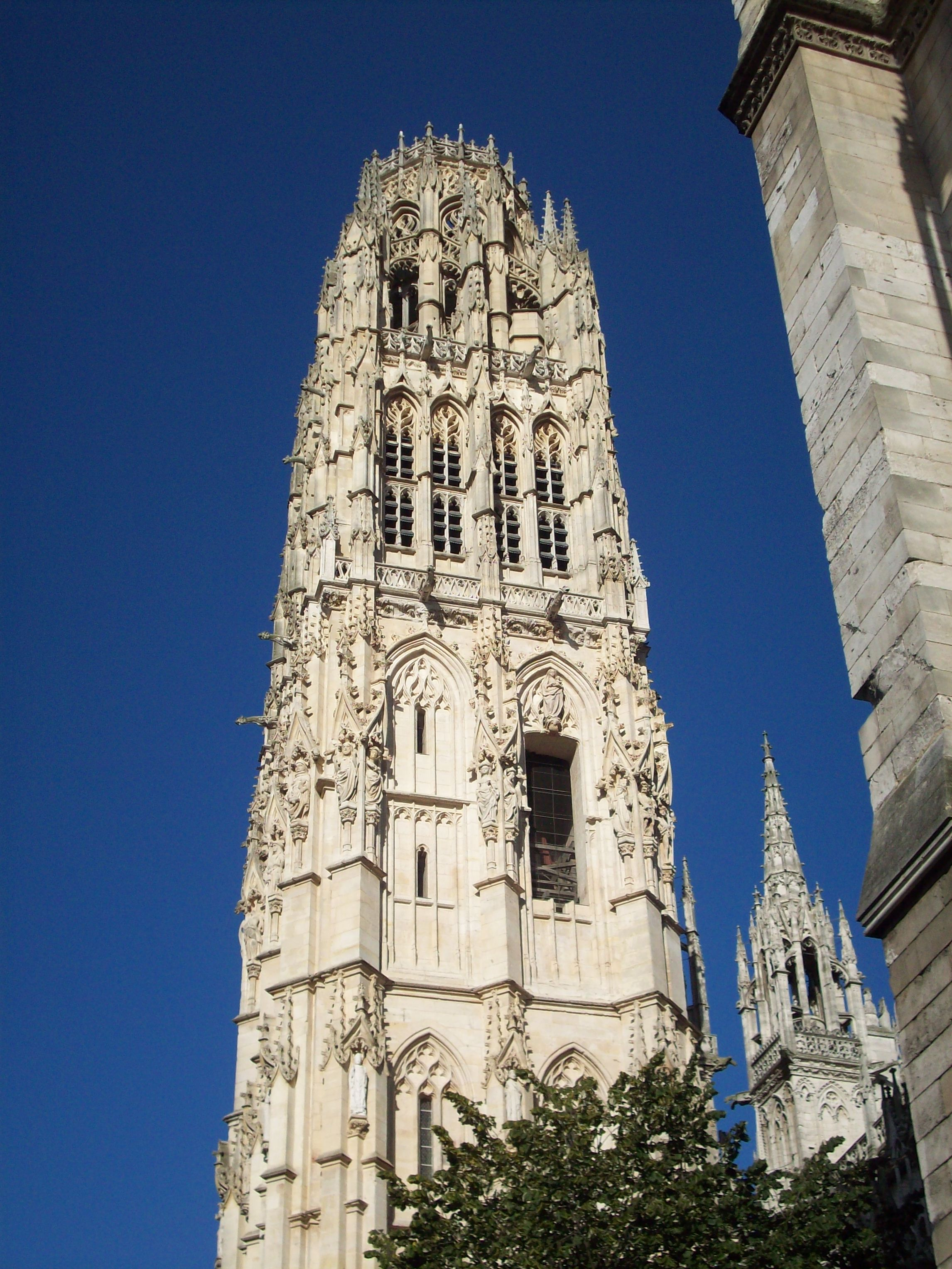 La tour du Beurre, vue depuis le portail de la Calende.